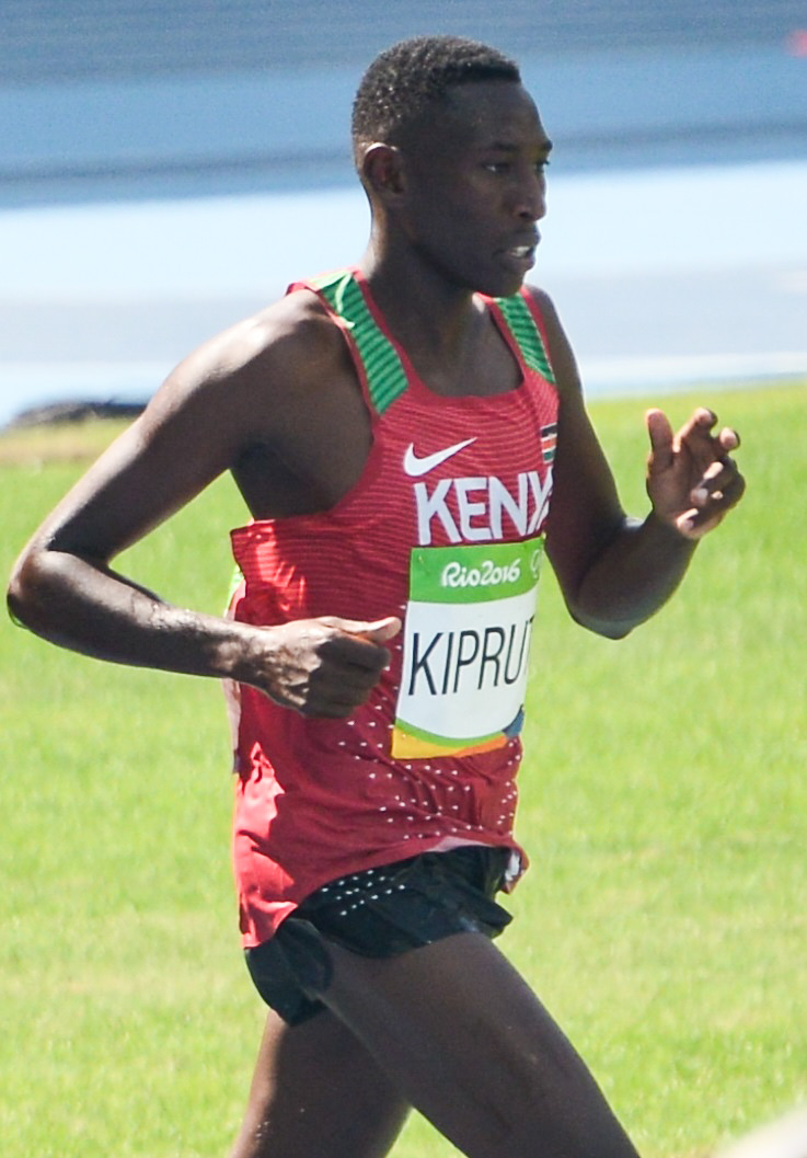 Conseslus Kipruto dans sa série du 3000m steeple des JO de Rio de 2016